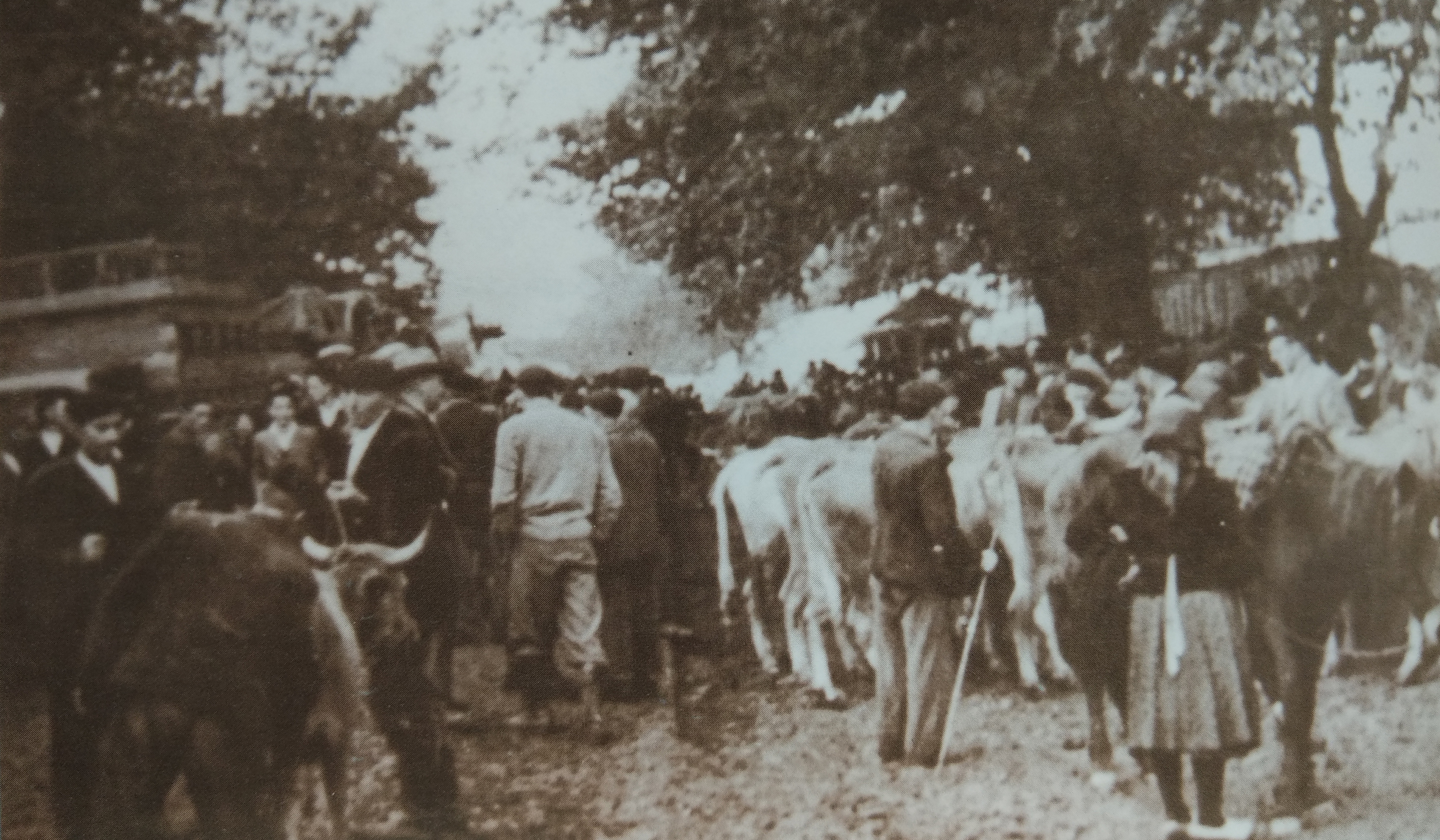 Feira das Cruces (Sobrado, Galiza).